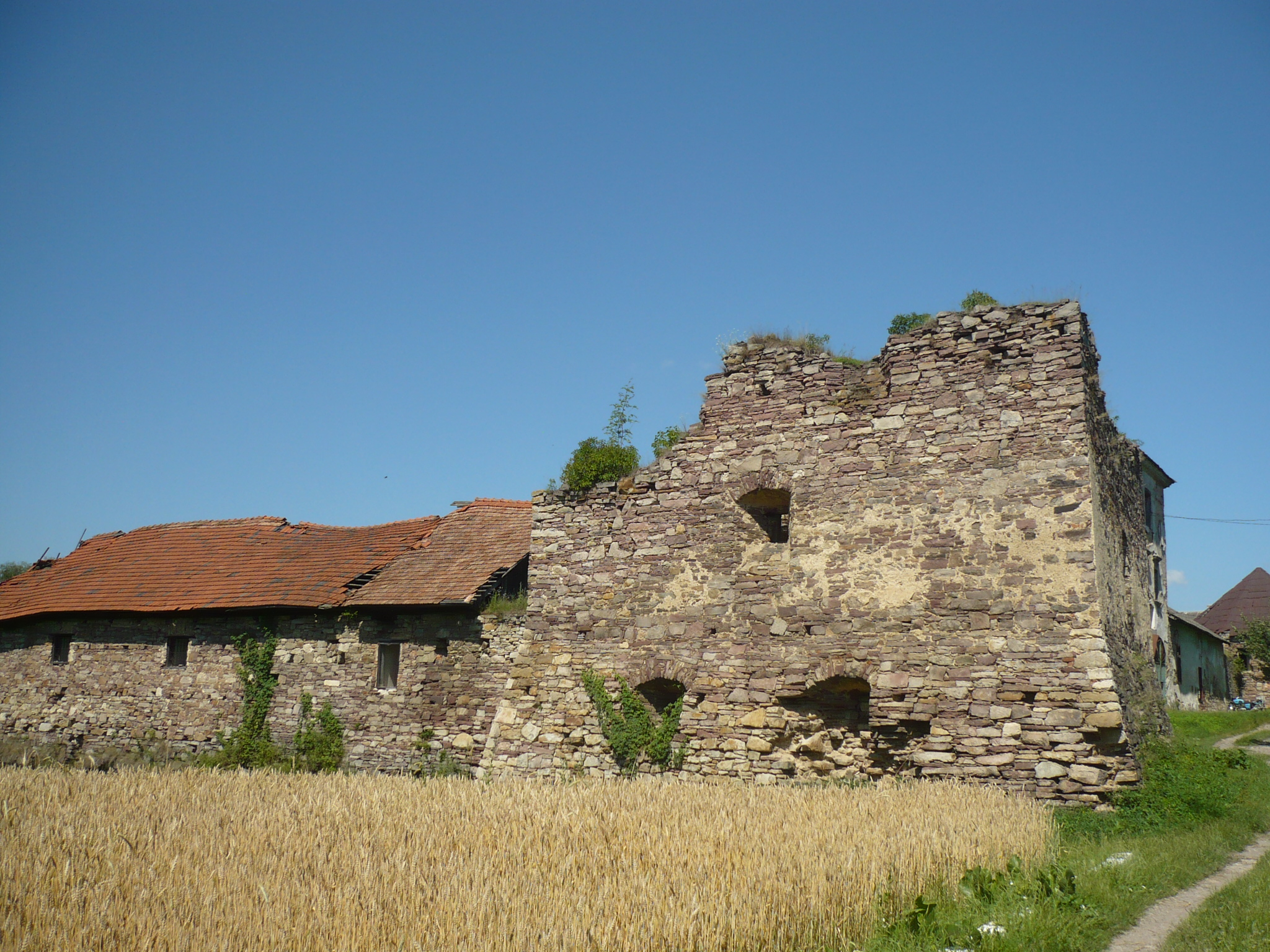 Potok Złoty. Zamek